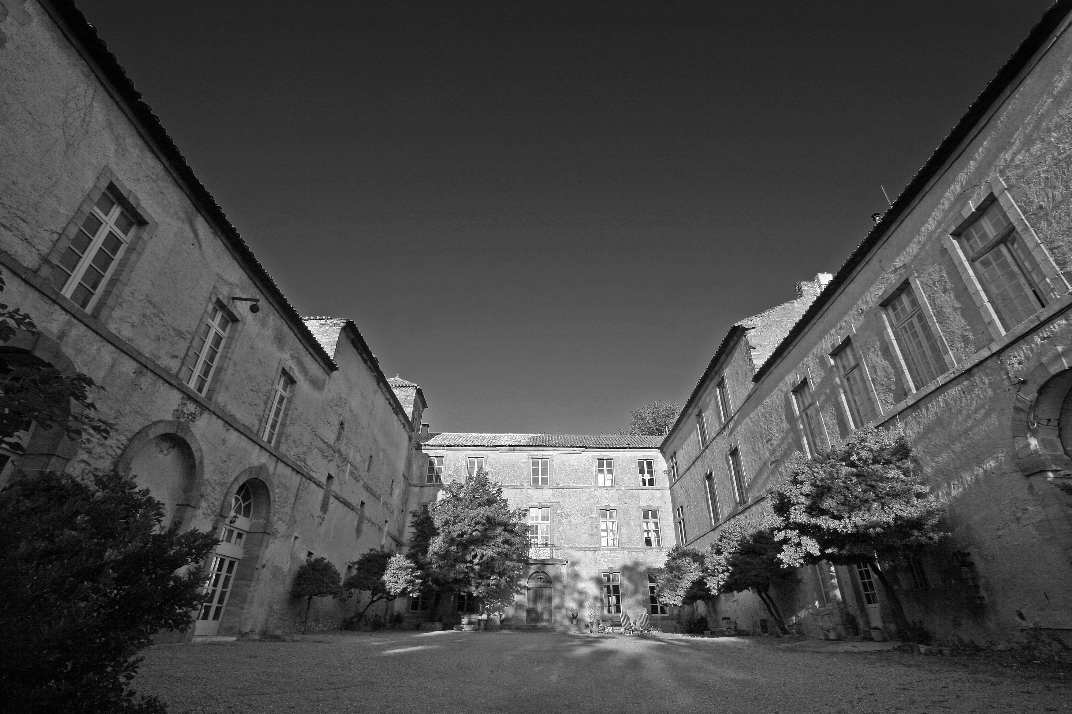 vue de la façade sud du château